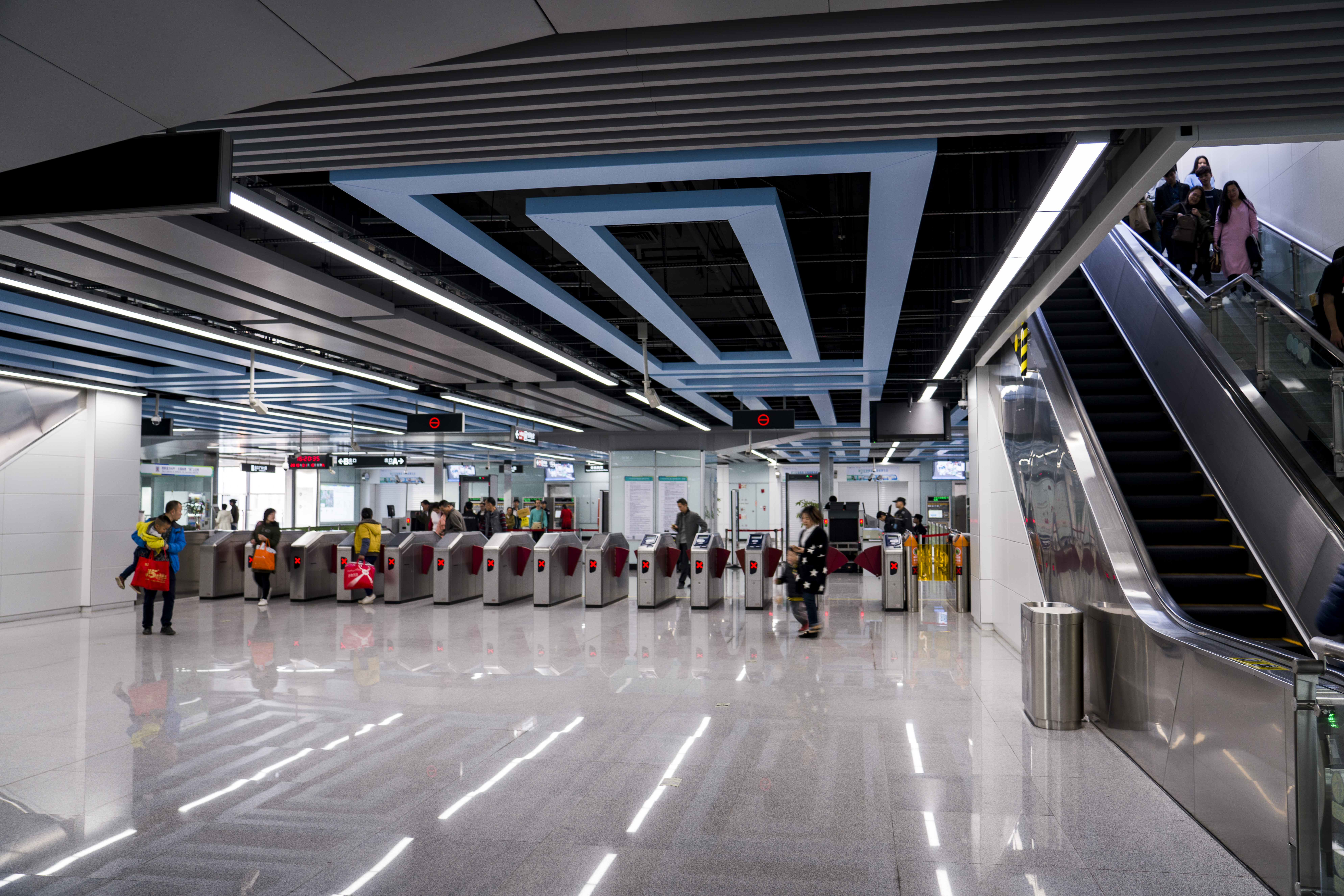 钟落潭站站厅